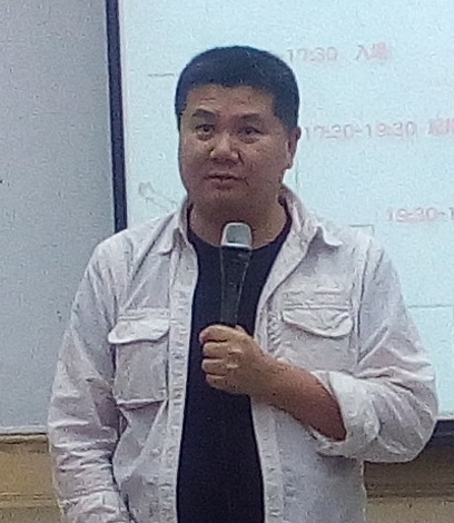 中文（台灣）: 台灣導演李惠仁，攝於2015年12月